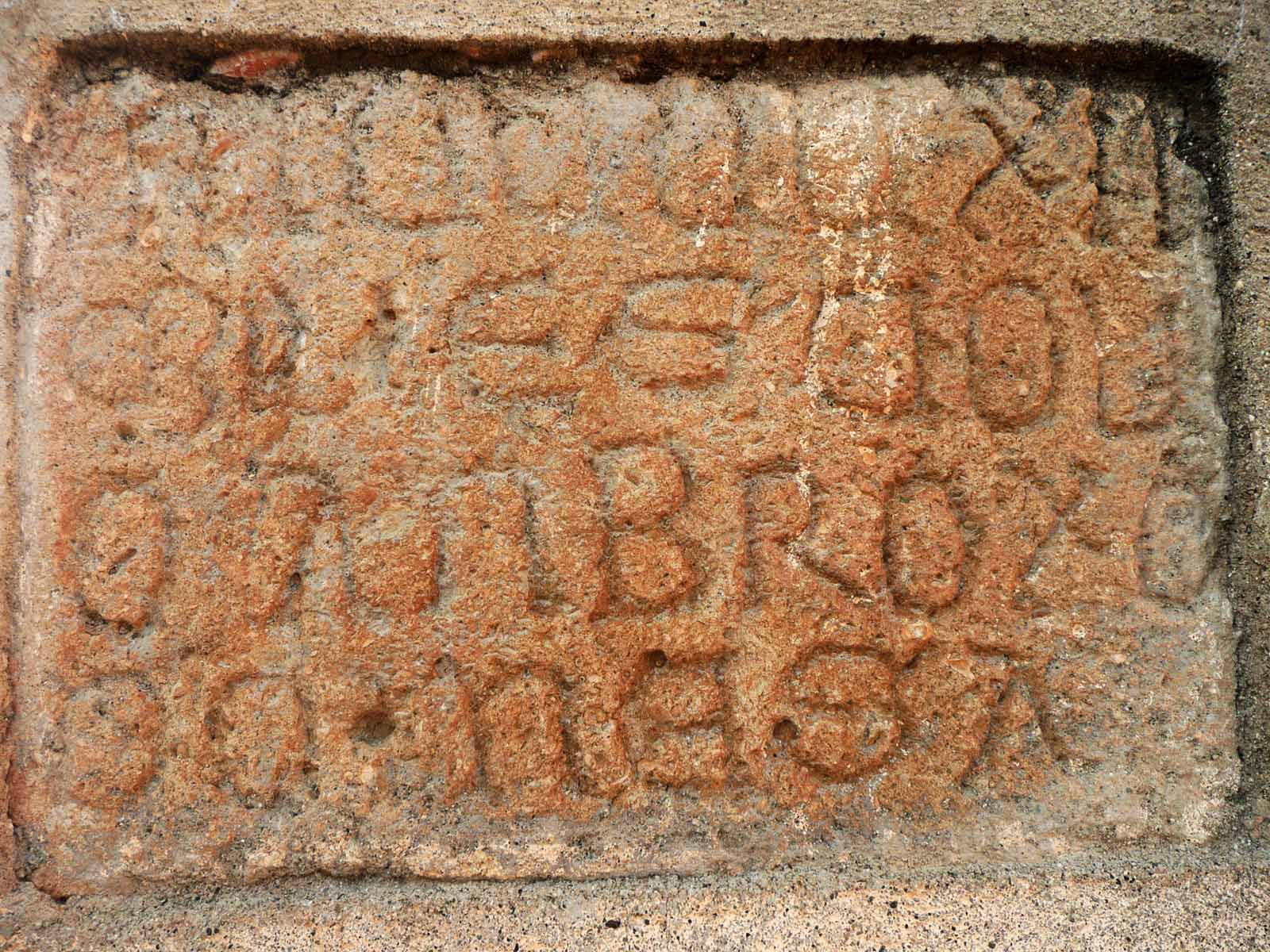 Pierre tombale originale du XVème siècle de l'évêque Ambrogio Colonna d'Omessa